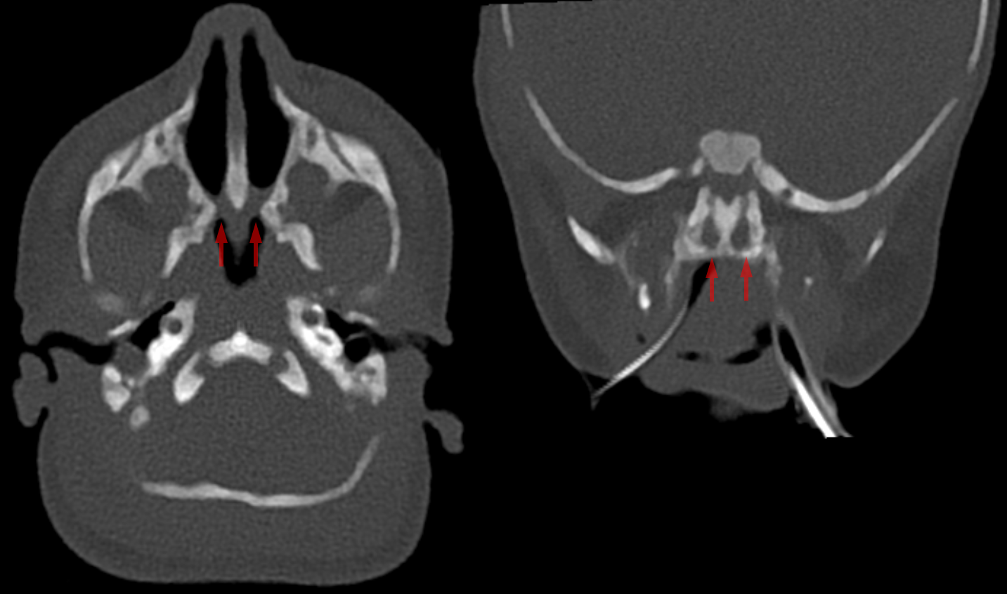 Membranöse, beidseitige Choanalatresie bei einem Neugeborenen. Darstellung in der Computertomographie axial und koronar (1 mm, Knochenfenster, IMR). Da die beidseitige Choanalatresie ein Notfall ist, ist das Kind intubiert.